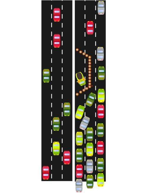 Bottleneck